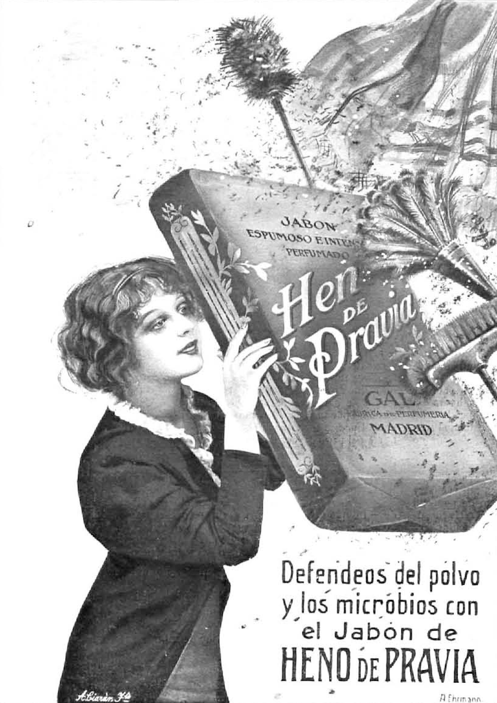 Anuncio de jabón Heno de Pravia, recogido en la revista española La Ilustración Española y Americana.